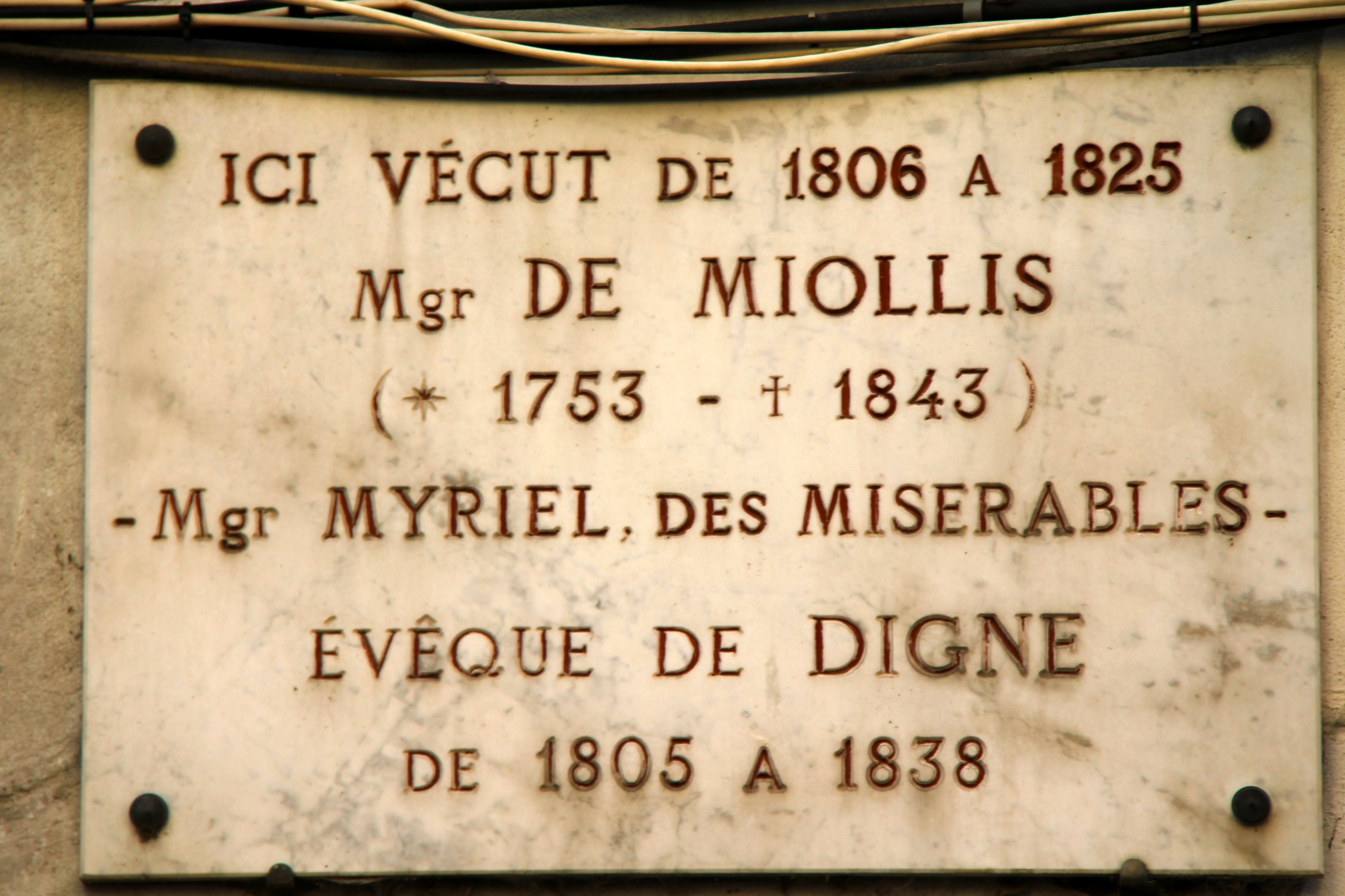 Plaque en l'honneur de l'évêque Charles François Melchior Bienvenu de Miollis que Victor Hugo a mis en scène dans les Misérables sous le nom de Monseigneur Myriel